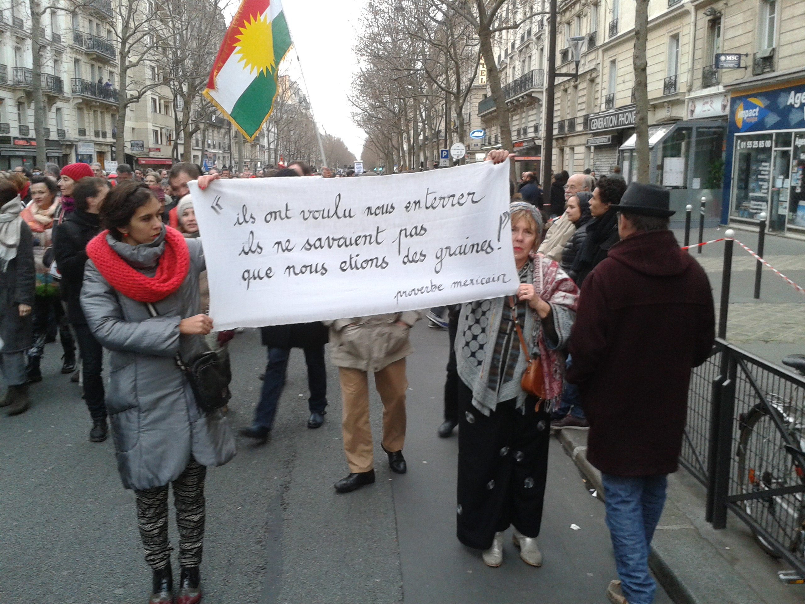 Arrivée de la marche dans le quartier place de la Nation, à Paris